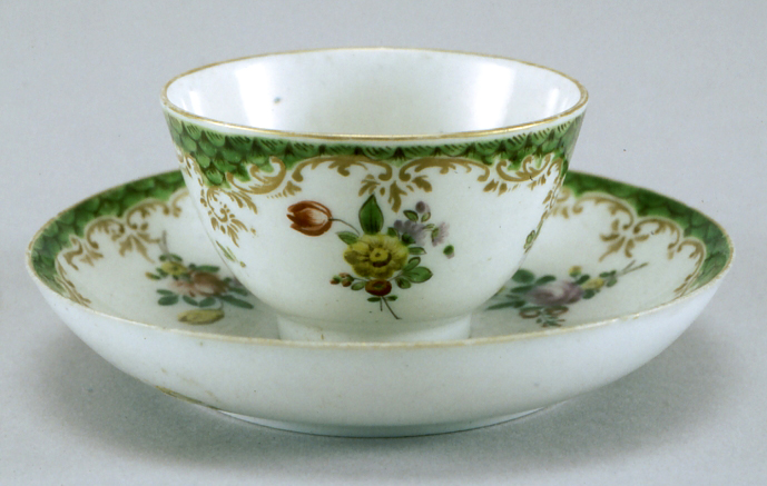 Tazzina con piattino in porcellana con decoro floreale. Venezia, Cozzi, seconda metà del XVIII secolo